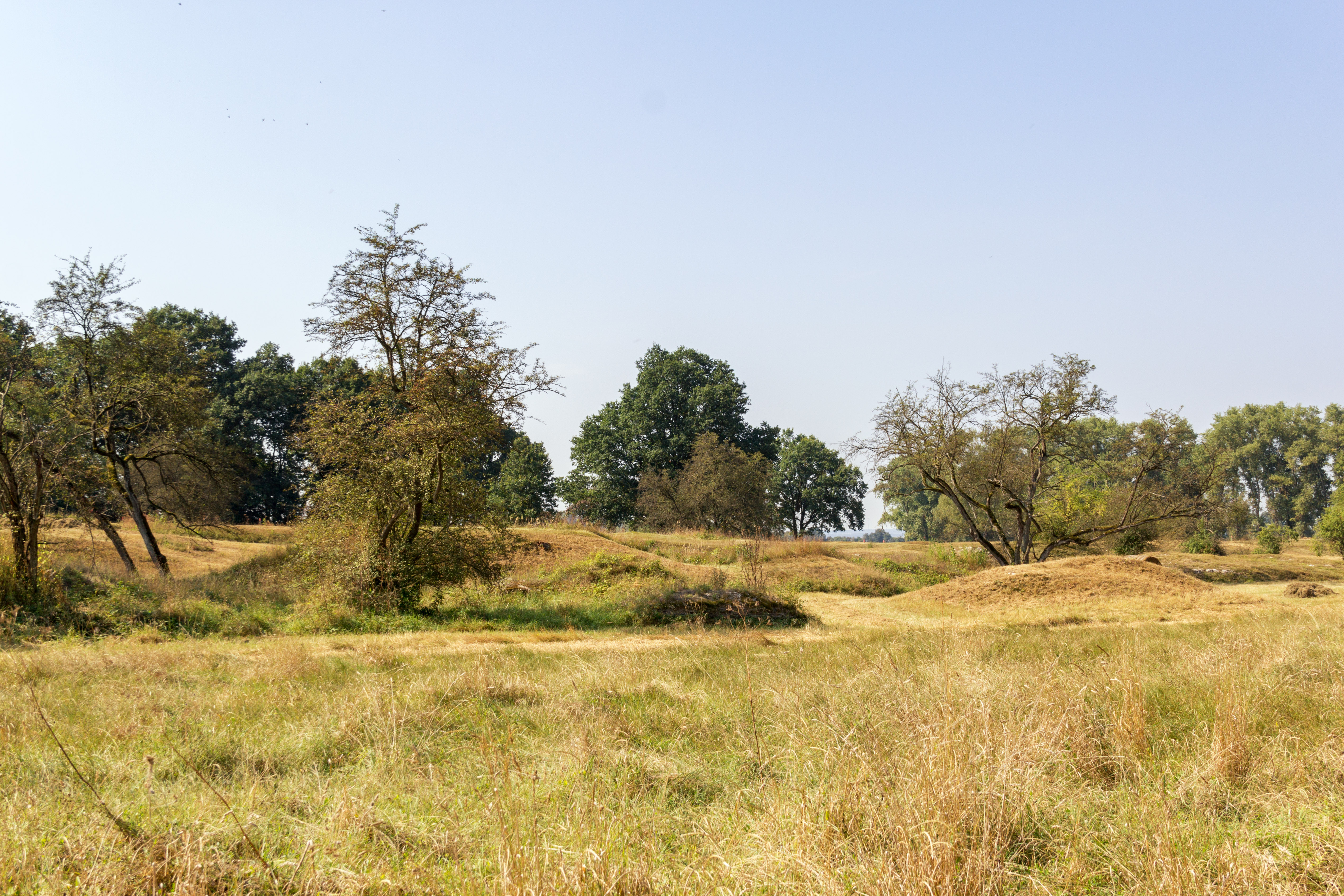 Sulzheimer Gipshügel, Naturschutzgebiet, Geotop, Sulzheim in Unterfranken